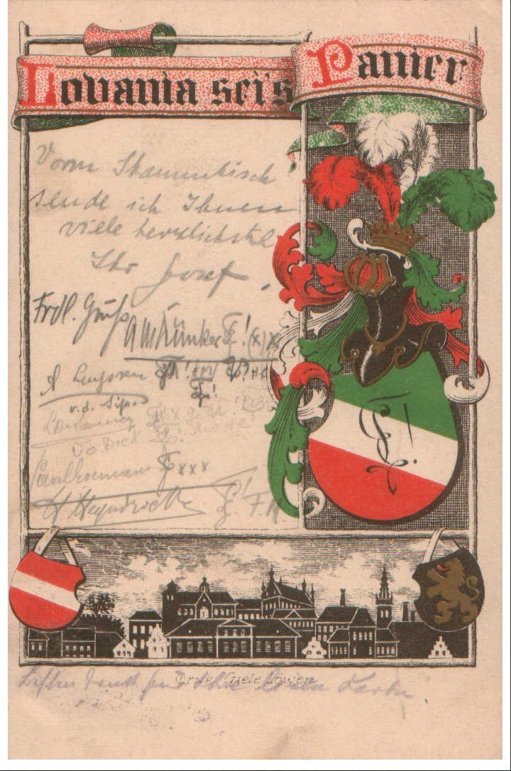 Couleurkarte der K.A.V. Lovania Löwen, St 1911